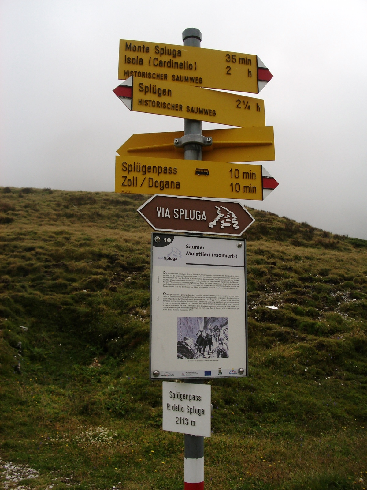 Splügenpass GR, Switzerland